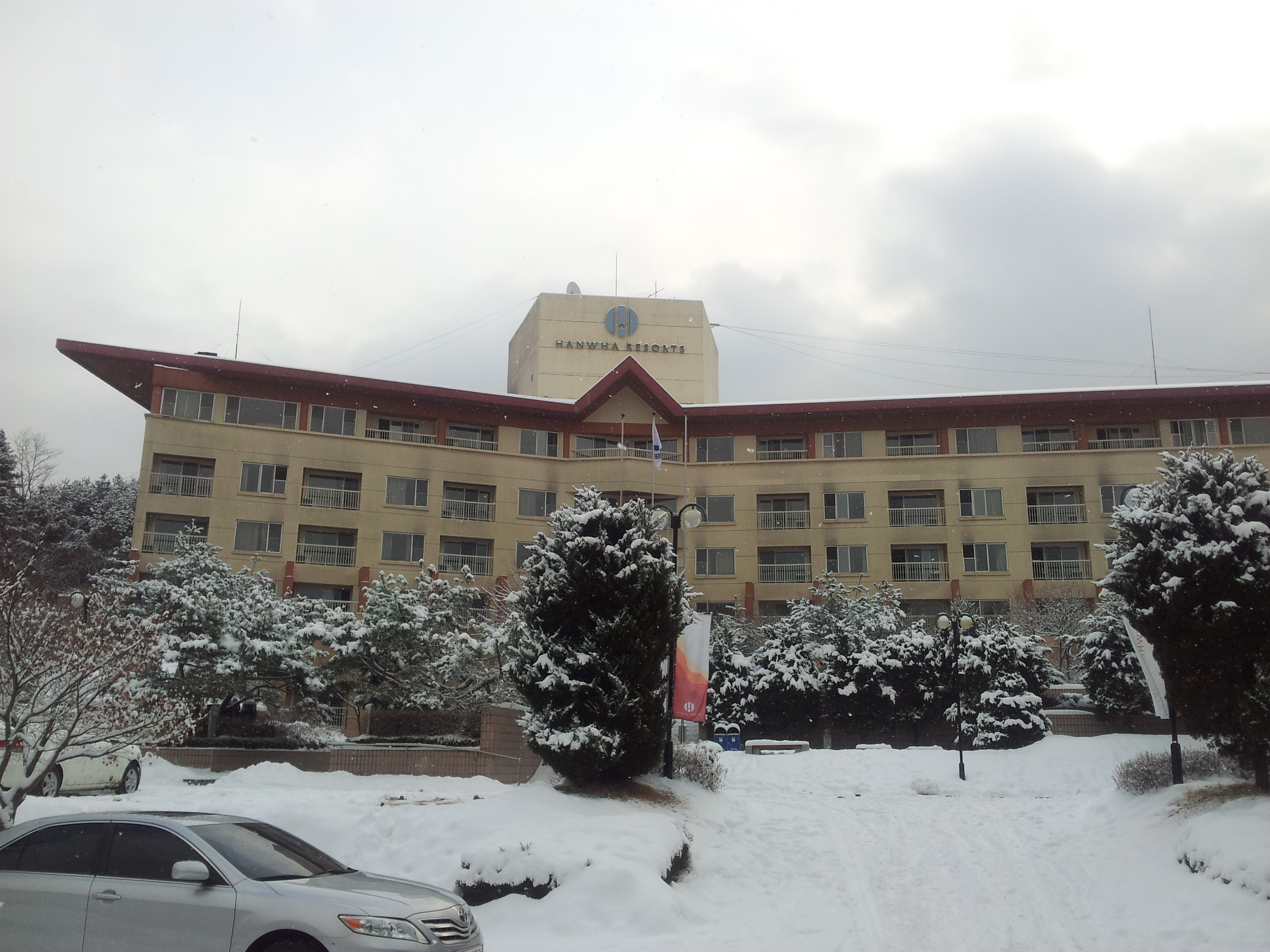 한화리조트 수안보